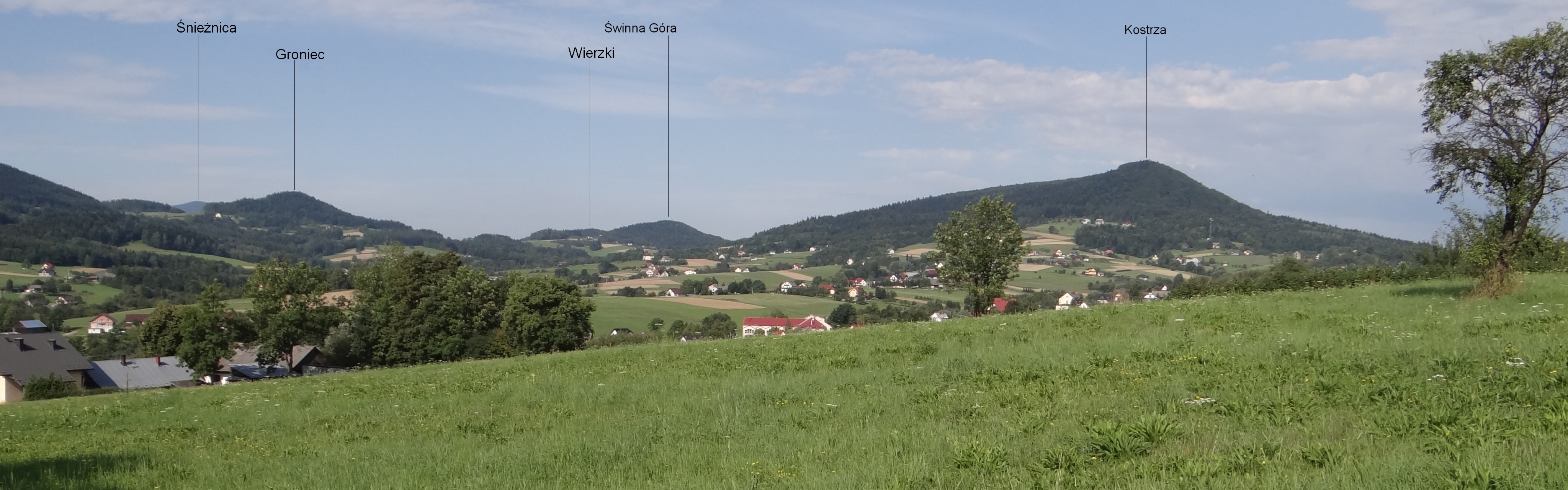 Panorama widokowa z Rybia